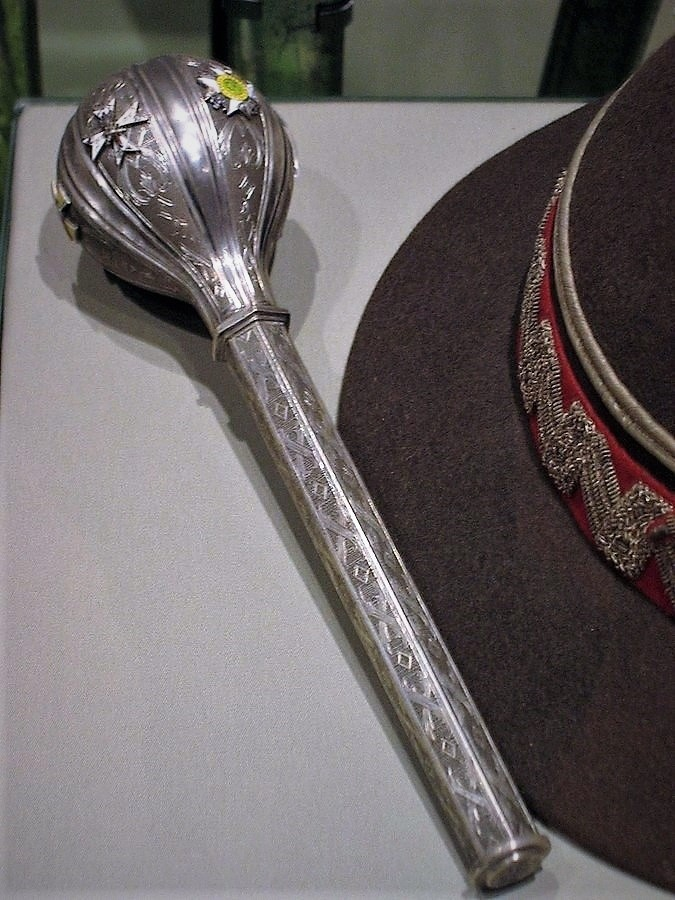 Buława marszałka Edwarda Rydza-Śmigłego author User:Mathiasrex Maciej Szczepańczyk